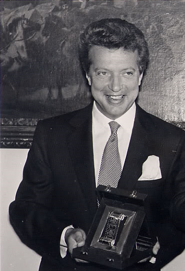 Vittorio Cecchi Gori alla premiazione del Nastro d'argento 1989